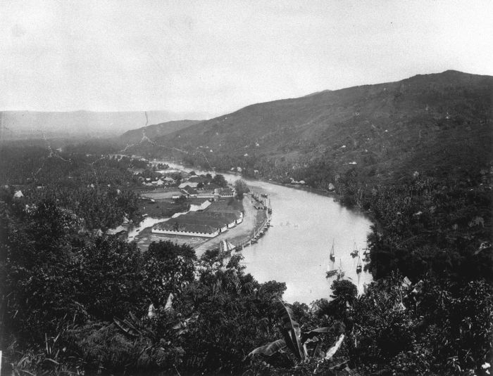 Foto. Pakhuizen te Padang langs de Arau-rivier in West-Sumatra, circa 1875.